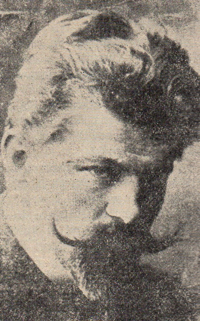 Henryk Jackowski-Nostitz, polski malarz i witrażysta.